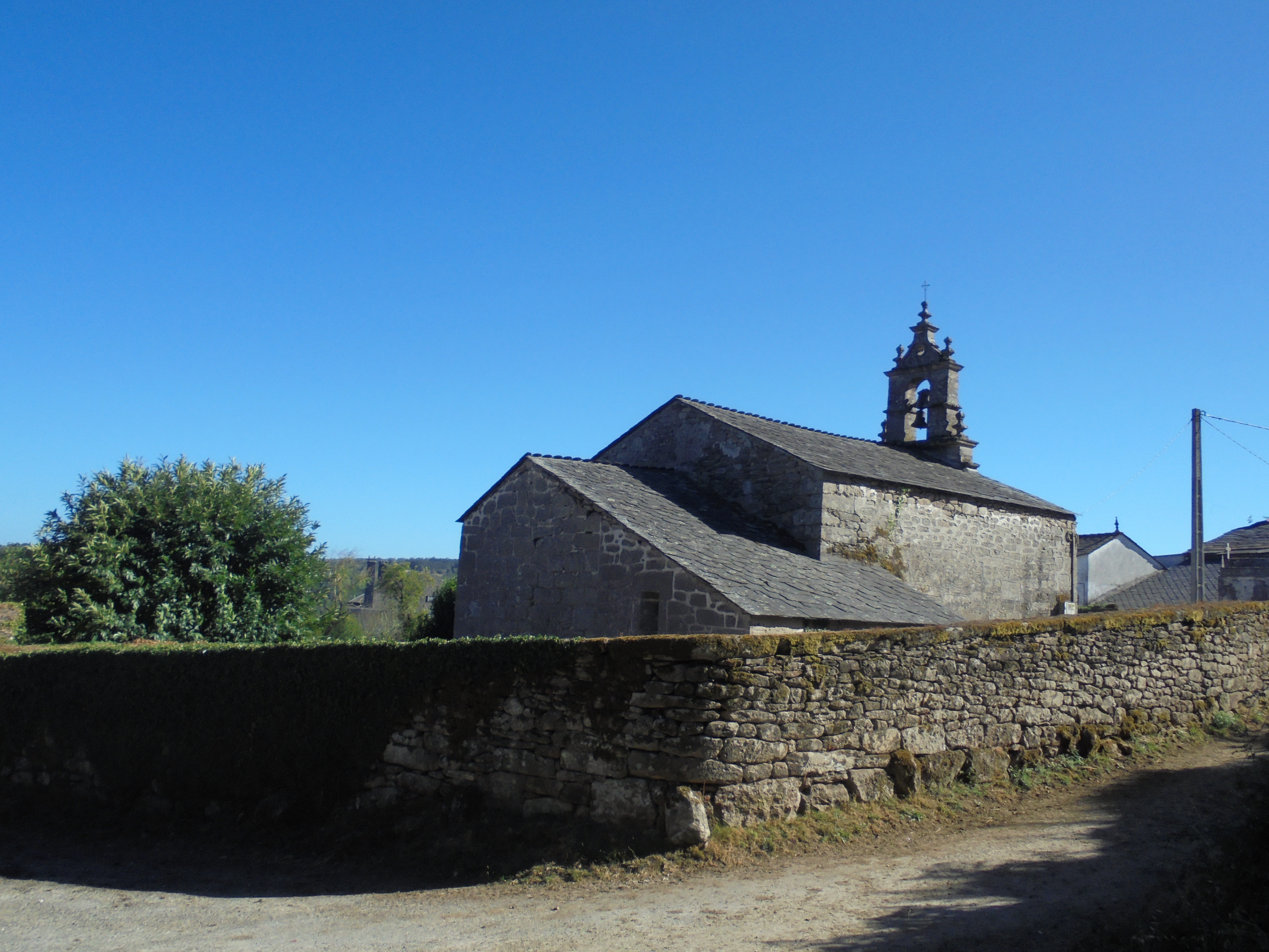 Igrexa parroquial do Veral (Lugo)